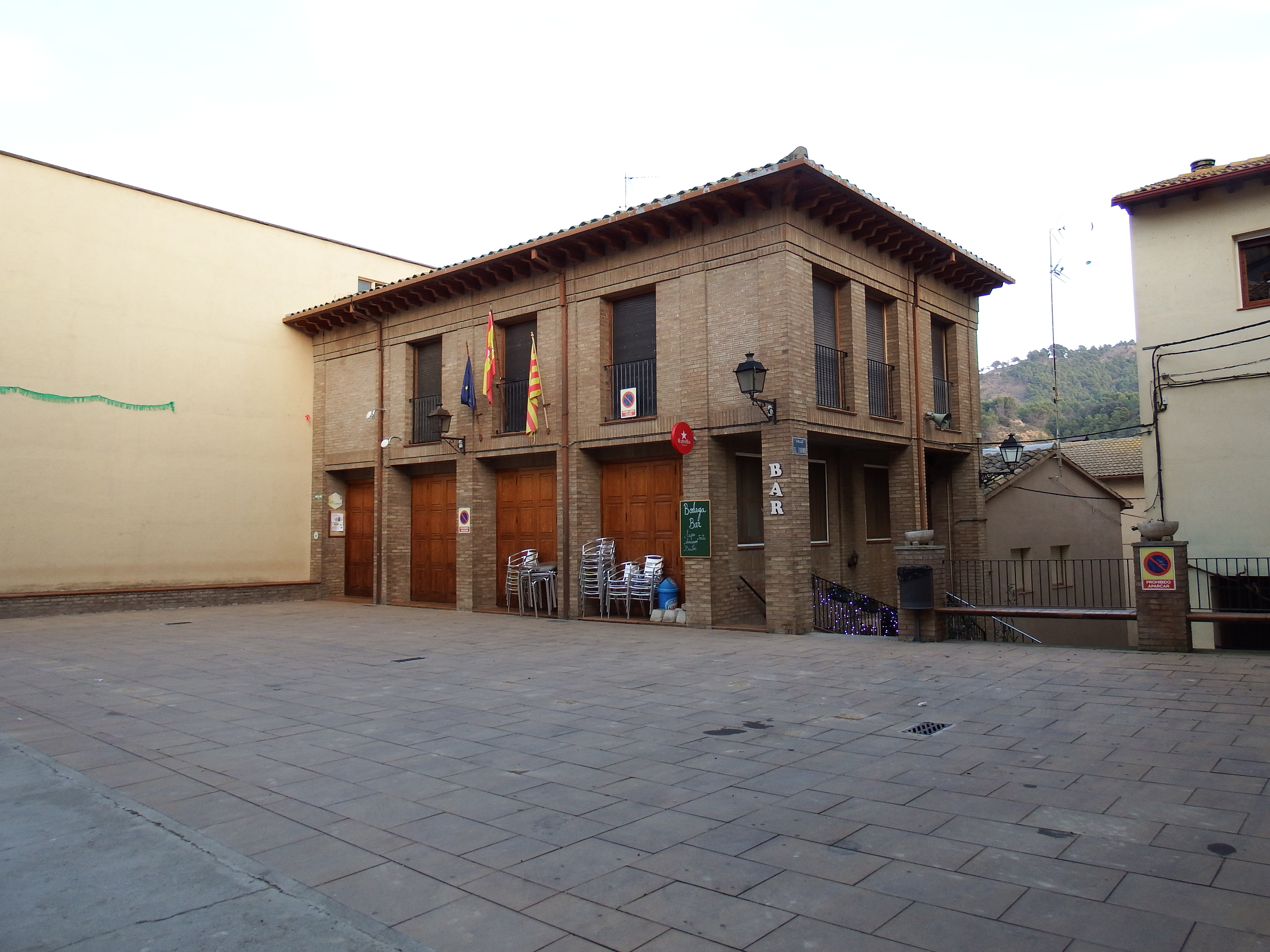 Santa María de Dulcis, ayuntamiento en Huerta de Vero